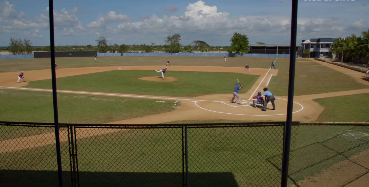 Campo de entrenamiento SPM.